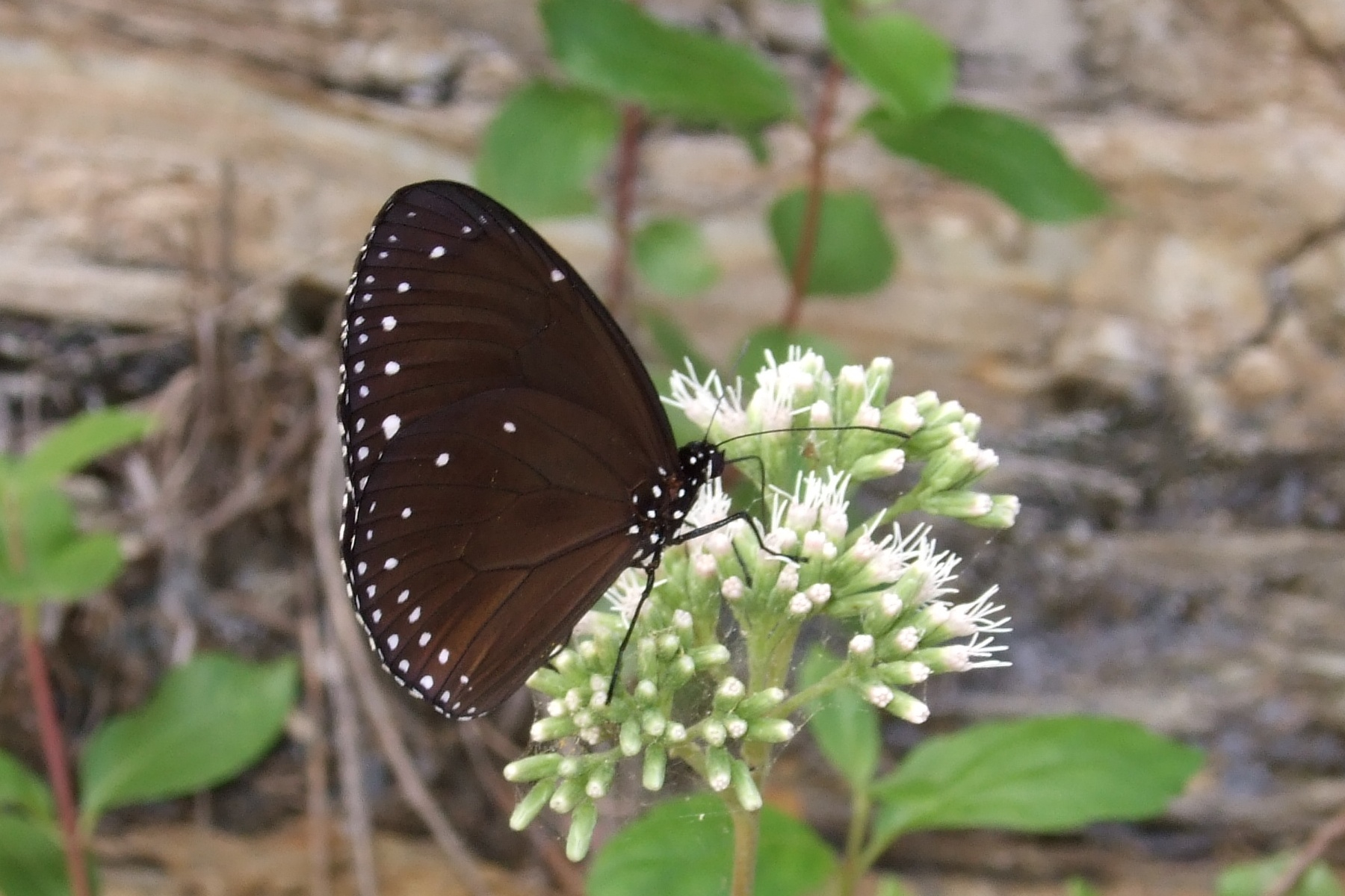 Taken in Taiwan